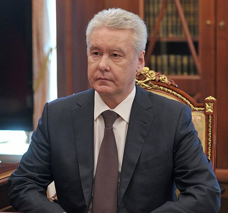 Мэр Москвы Сергей Собянин